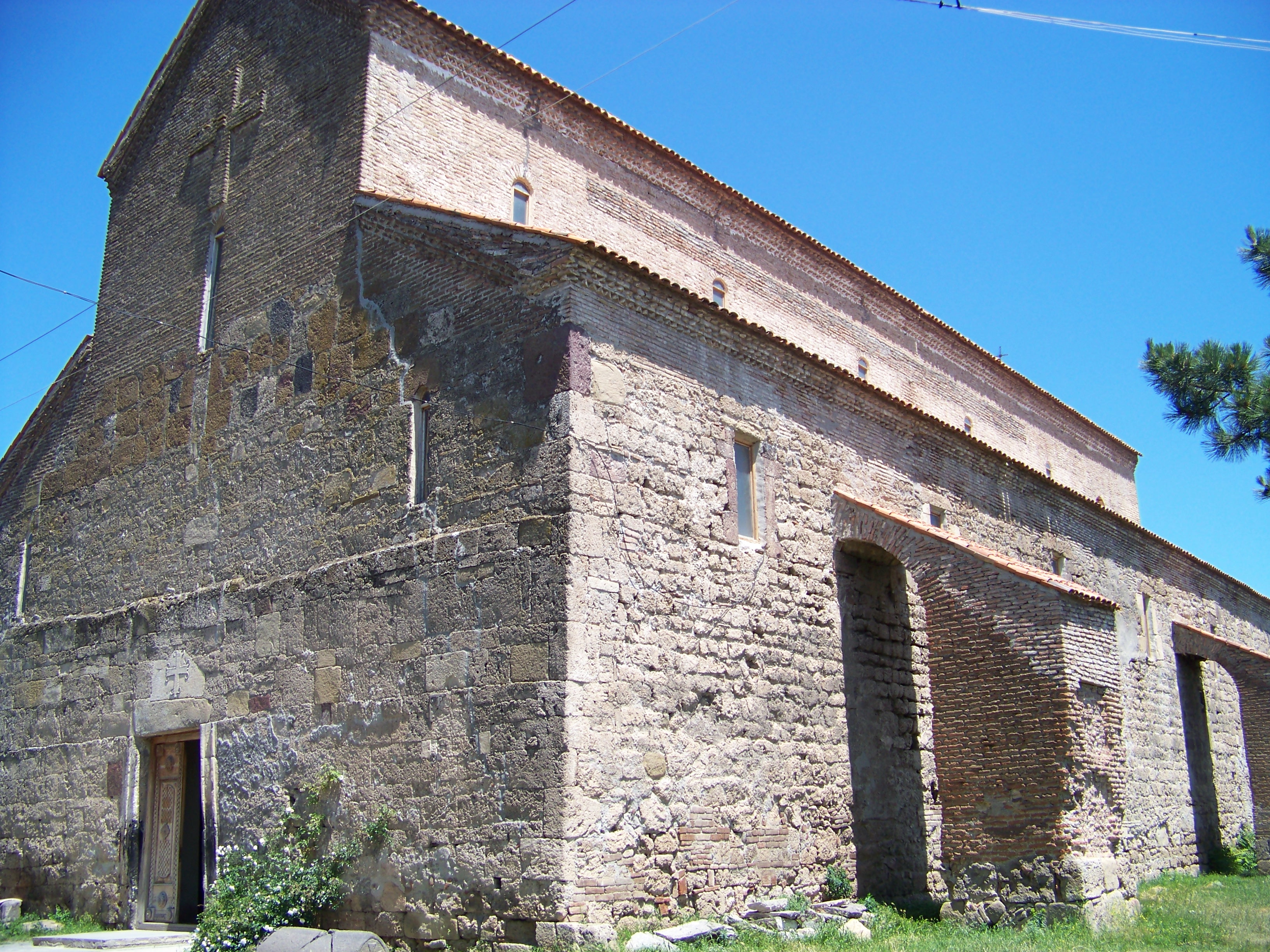 ურბნისის სიონი, გალავანი, სამრეკლო, აბანო, მარანი, წყალსადენი